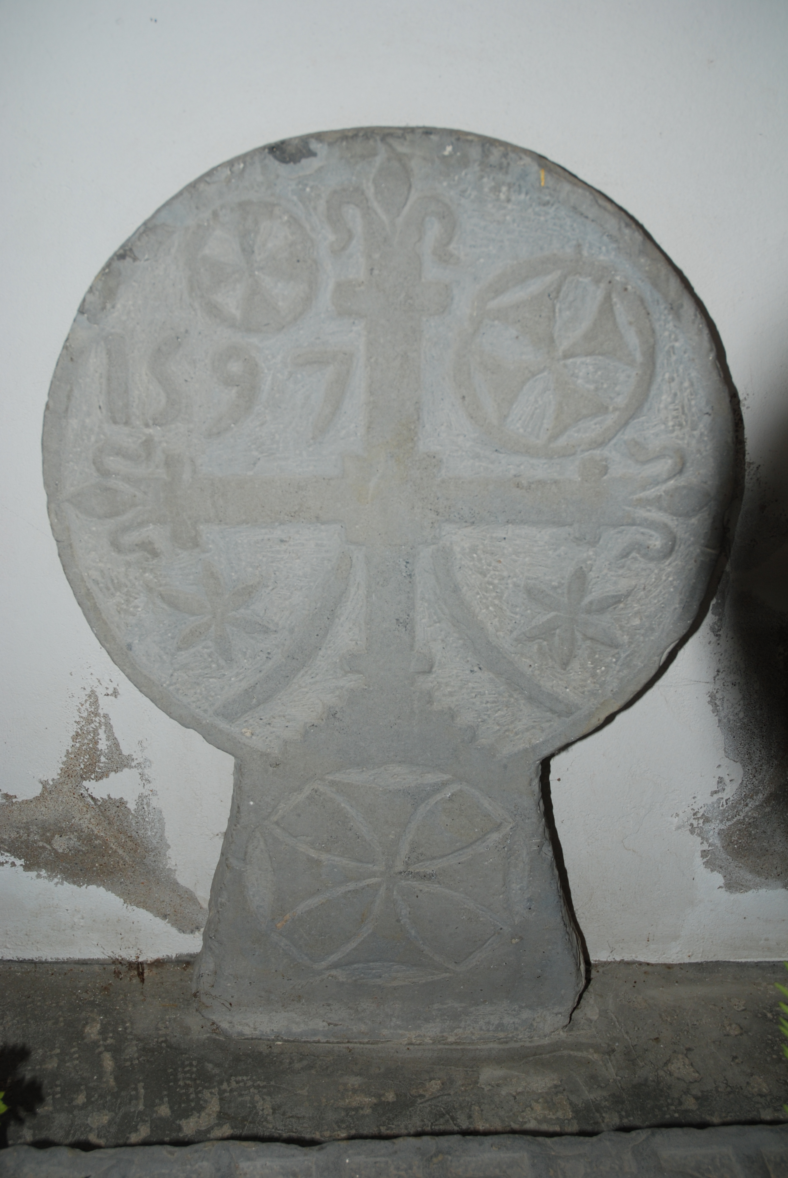 Iholdy, stèle discoïdale